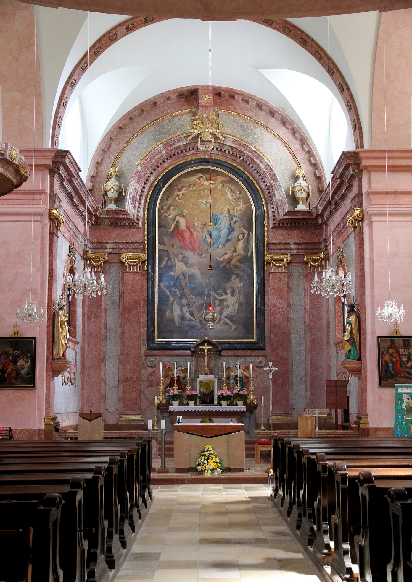 Hochaltar der katholischen Pfarrkirche Allerheiligste Dreifaltigkeit in Karnabrunn, ein Dorf in der niederösterreichischen Marktgemeinde Großrußbach.